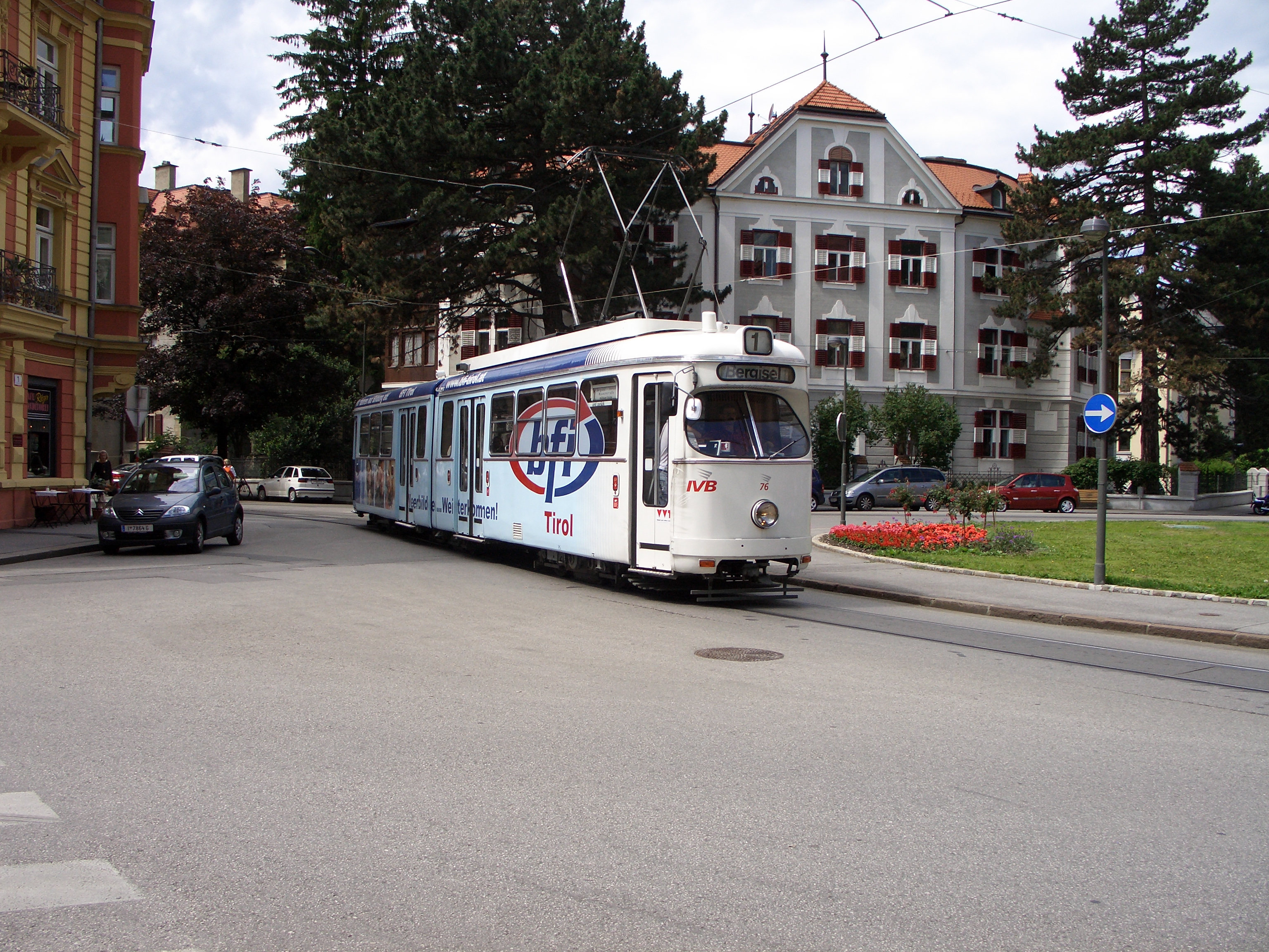 TW 76, Innsbrucker Straßenbahn, Lohner, 6ax